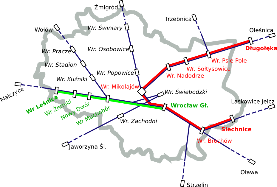 Źródło